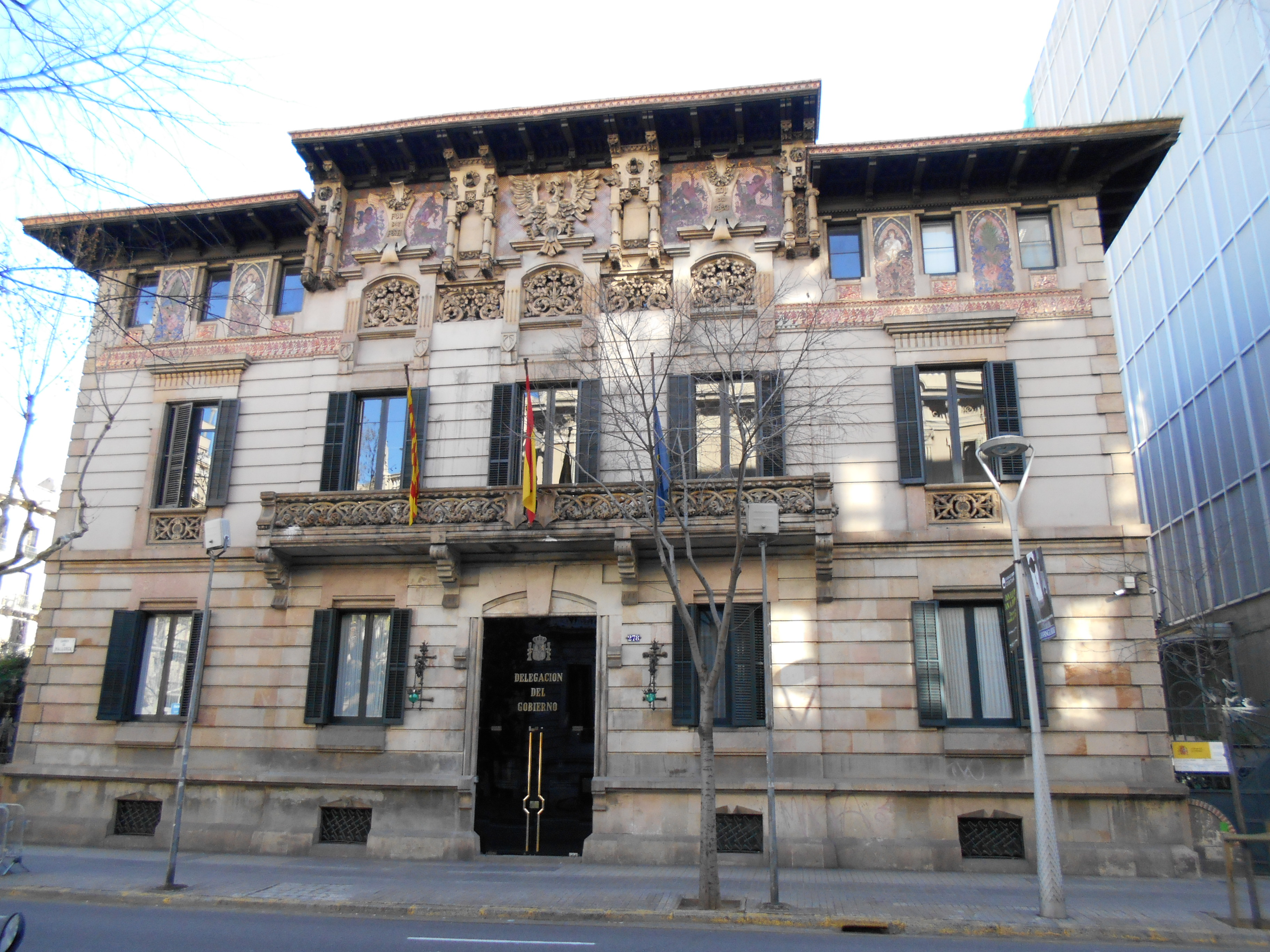 Palacio Ramon Montaner.